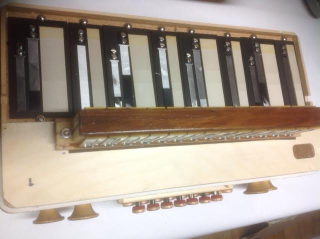 Traditioneller Einbau der Helikonstimmplatten